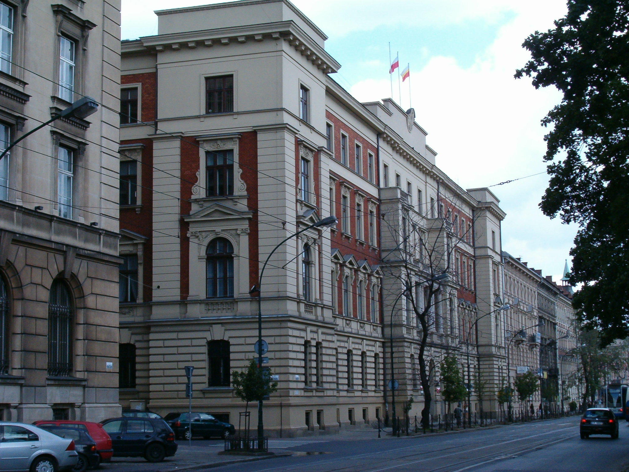 Małopolski Urząd Wojewódzki w Krakowie